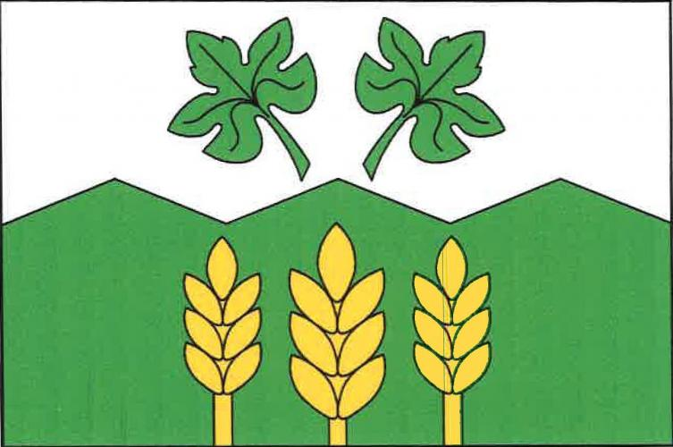 Sedlec, okres Mladá Boleslav, vlajka